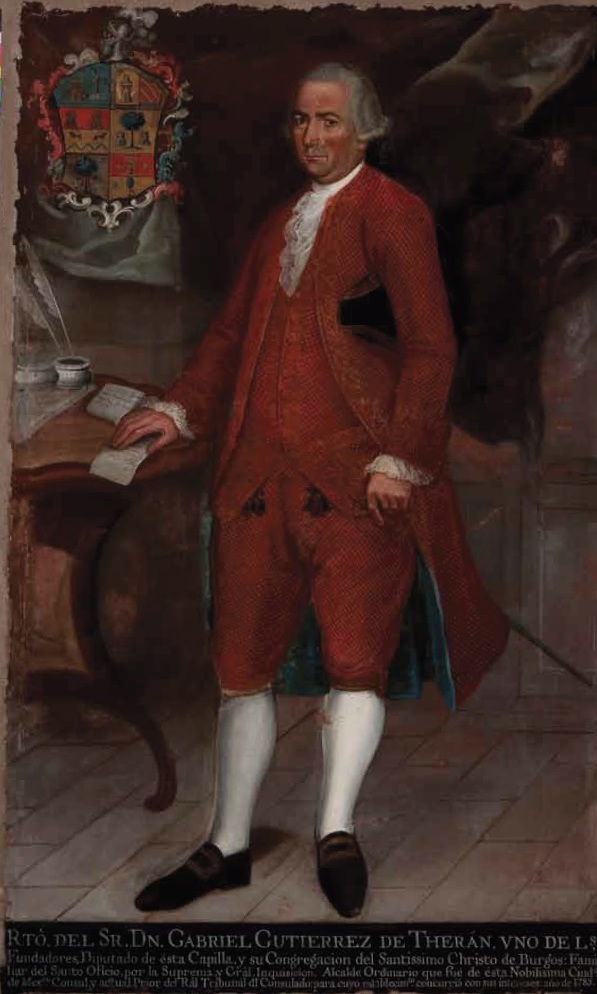 Retrato de Gabriel Gutiérrez de Terán, alcalde de Ciudad de México y Prior del Consulado de Comerciantes de Máxico - Museo Nacional de Historia de México - Autor José Esquivel